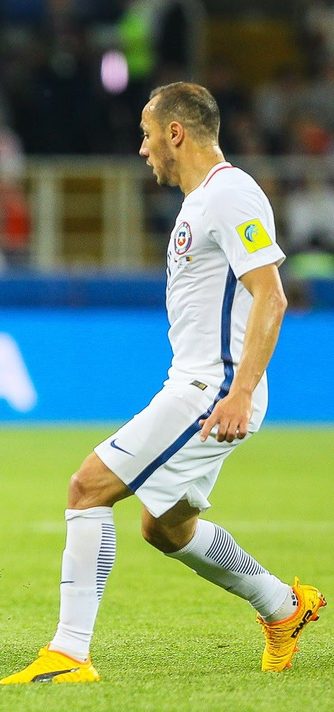 Marcelo Díaz, el día 19 de junio de 2017, en el Chile versus Camerún de la Copa Confederaciones de aquel año.